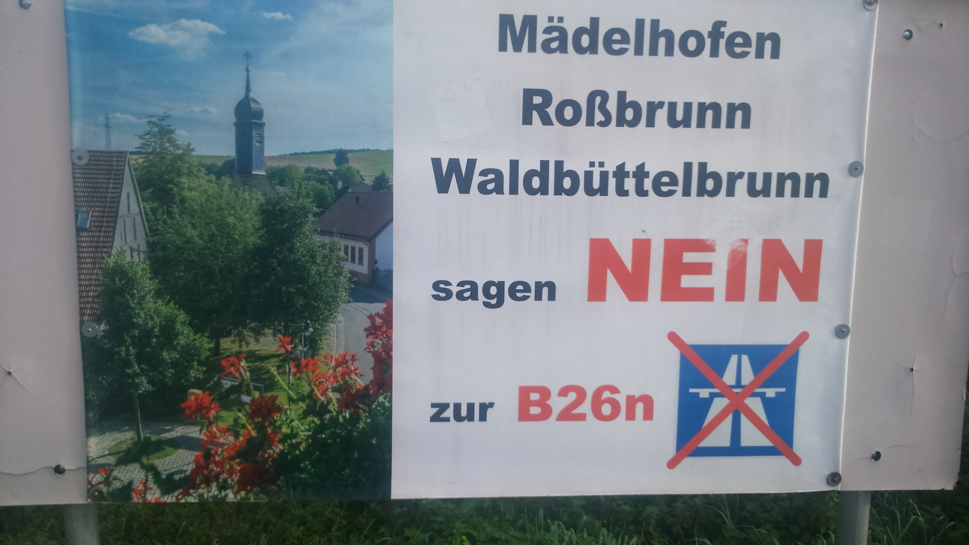 Plakat einer Bürgerinitiative gegen die Bundesstraße 26n